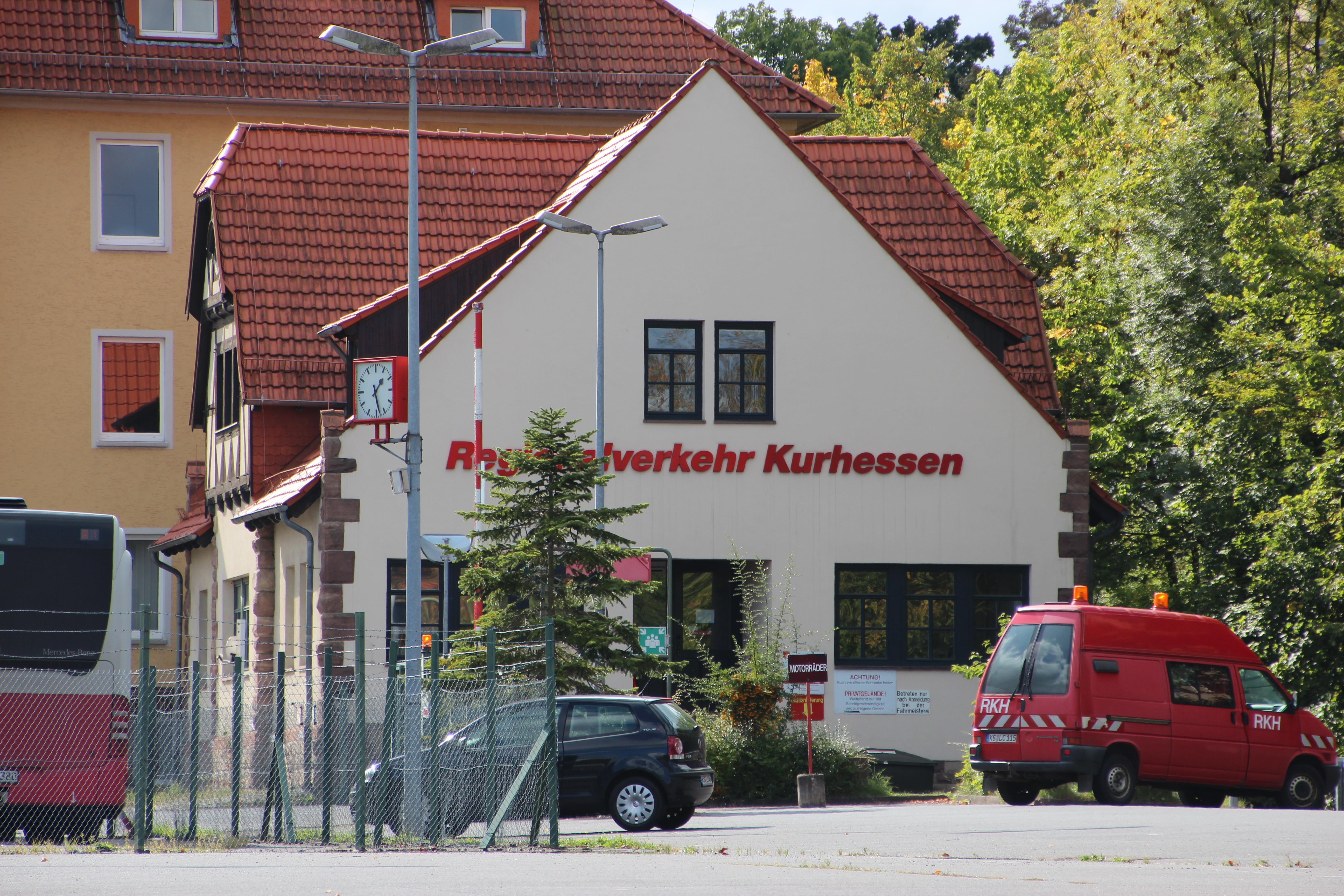 Teil der ehemaligen Husarenkaserne, Bosestraße 3 in Kassel